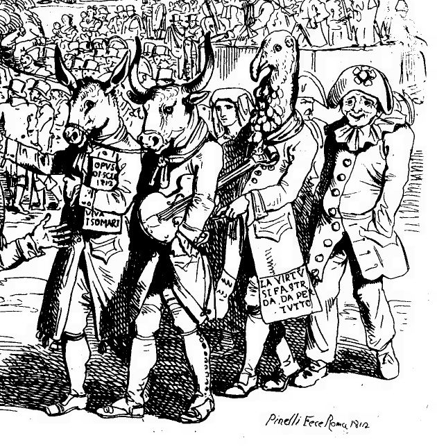 Détail d'une gravure.